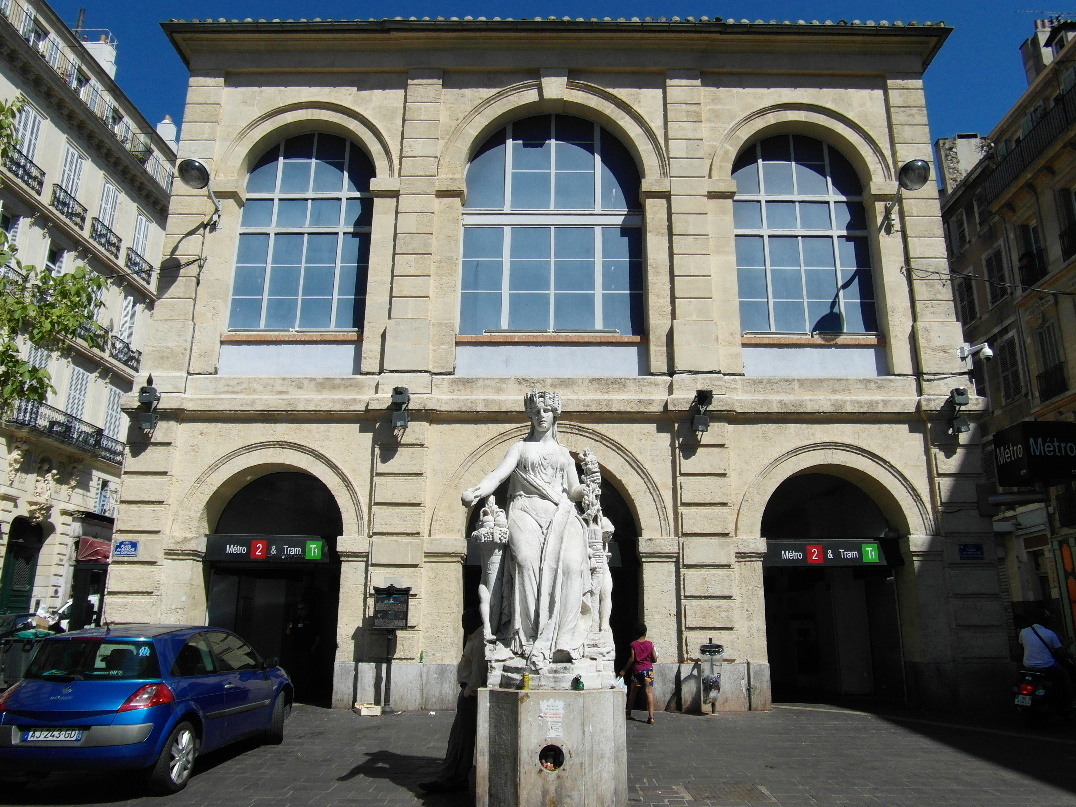 Marseille - Métro & Tramway - Noailles